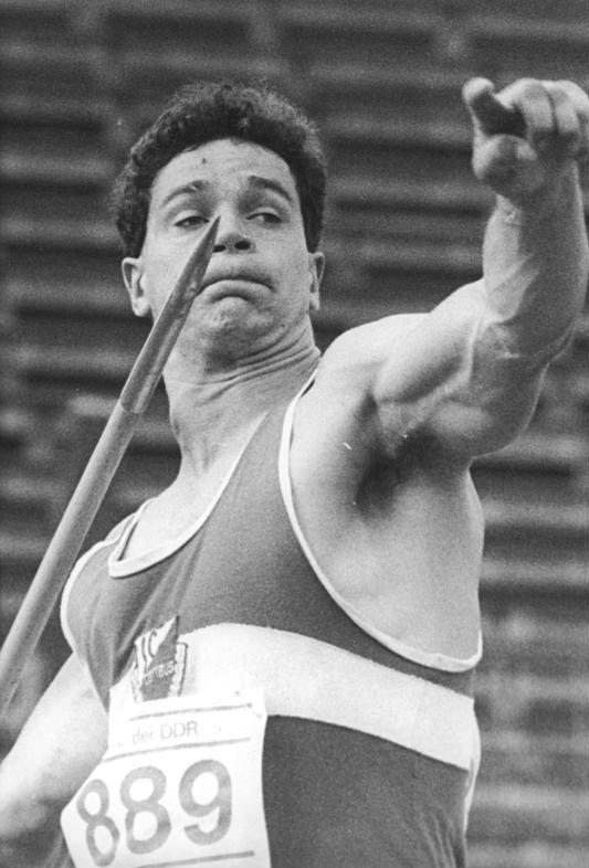 Silvio Warsönke ADN-ZB Sindermann -29.5.88-wo-Rostock: Werfertag- In die Weltspitze katapultierte sich der 20jährige Speerwerfer Silvio Warsönke vom SC Cottbus. Mit 84,14 M stellte der Cottbuser bei diesen Olympia-Qualifikationswettkämpfen einen neuen DDR-Rekord auf.